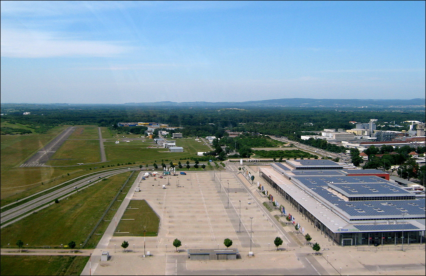 Neue Messe am Flugplatz Freiburg